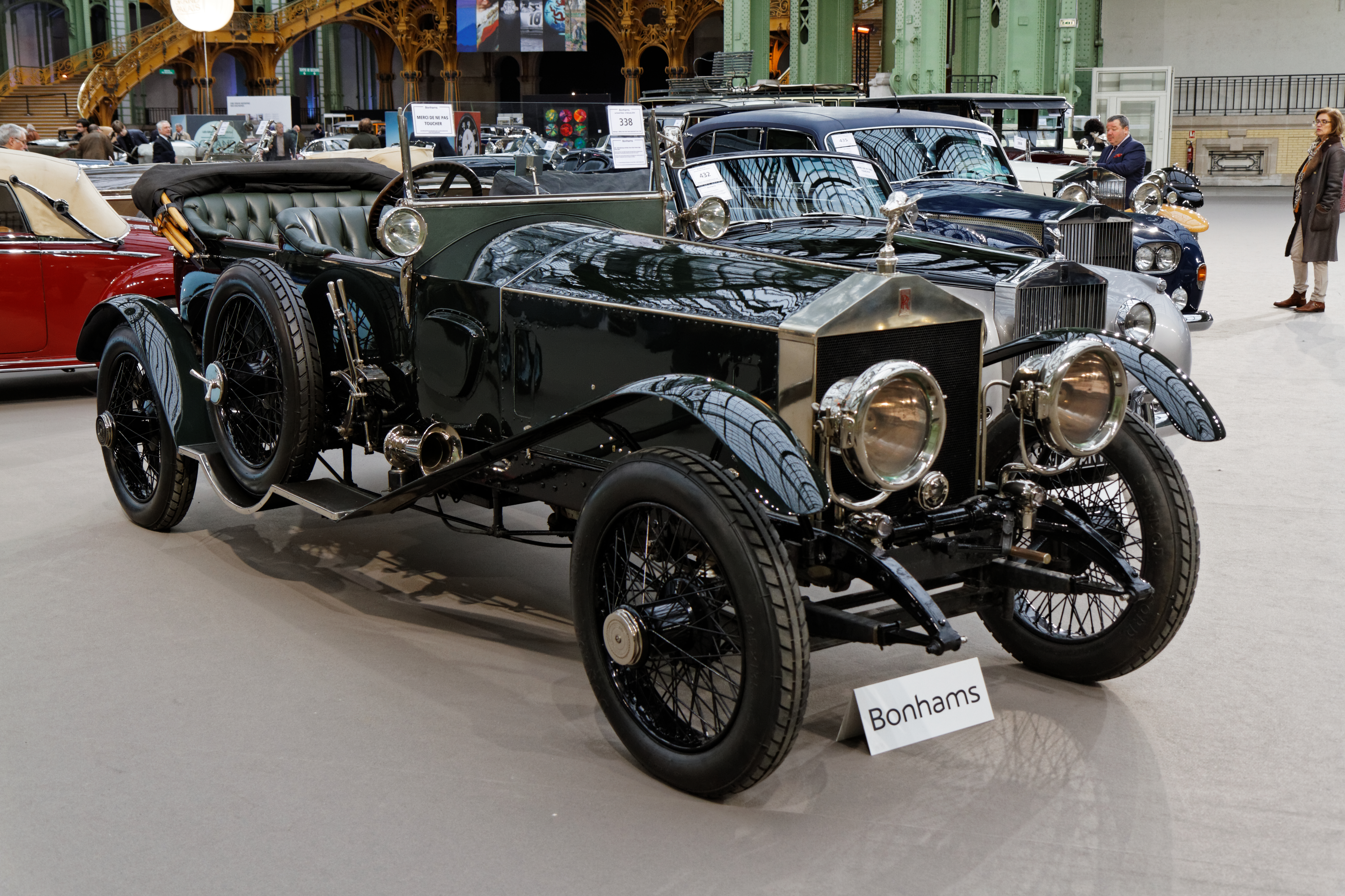 Une Rolls-Royce 45 50 HP Silver-Ghost Alpine Eagle Sports Tourer au Grand Palais lors de la vente Bonhams en février 2014.